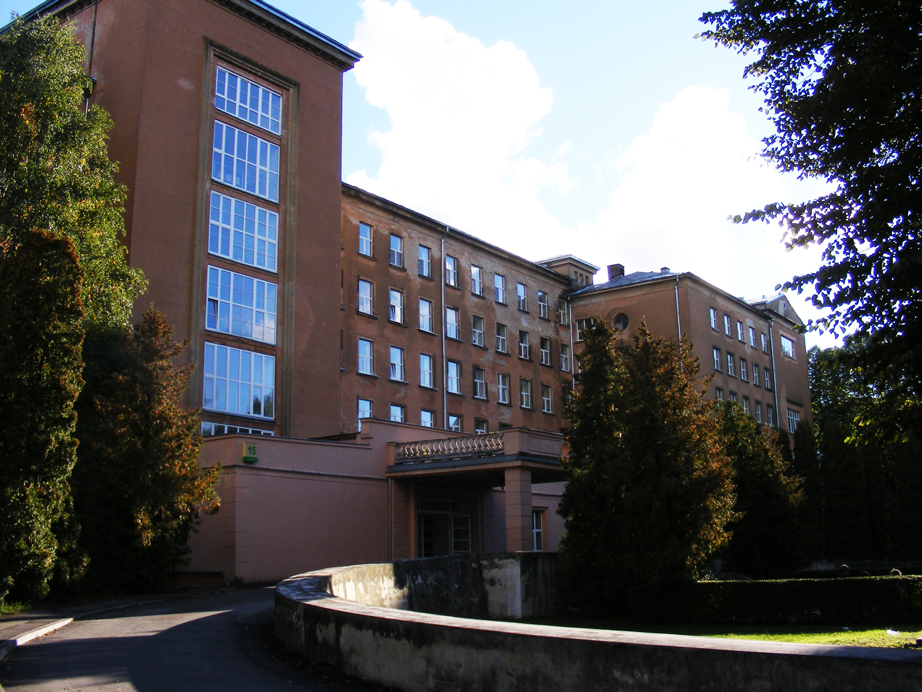 Slimnīcas celtņu komplekss, Rīga, Pilsoņu iela 13